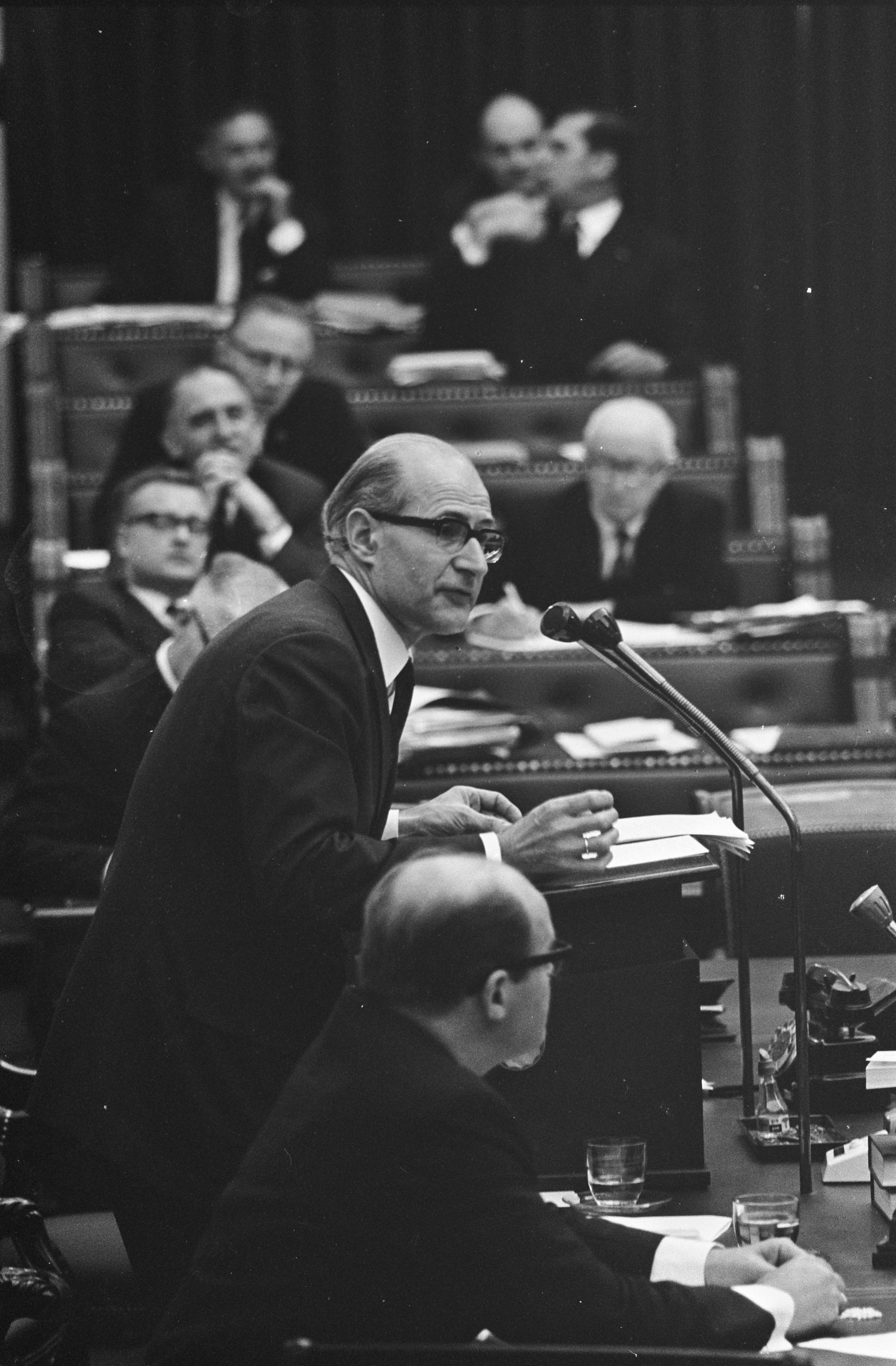 Collectie / Archief : Fotocollectie Anefo Reportage / Serie : [ onbekend ] Beschrijving : Kamerdebat over huurdersbelasting; minister van Volkshuisvesting en Ruimtelijke Ordening Schut in de verdediging voor het wetsvoorstel Datum : 16 oktober 1968 Locatie : Den Haag, Zuid-Holland Trefwoorden : ministers, parlementaire debatten, wetsontwerpen Persoonsnaam : Schut, W.F. Fotograaf : Koch, Eric / Anefo Auteursrechthebbende : Nationaal Archief Materiaalsoort : Negatief (zwart/wit) Nummer archiefinventaris : bekijk toegang 2.24.01.05 Bestanddeelnummer : 921-7704